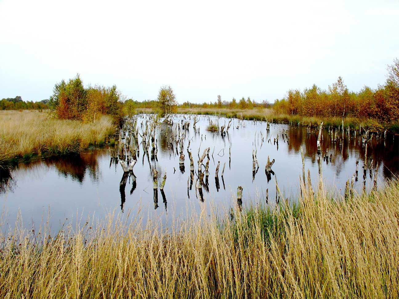 Meerstalblok in het Bargerveen